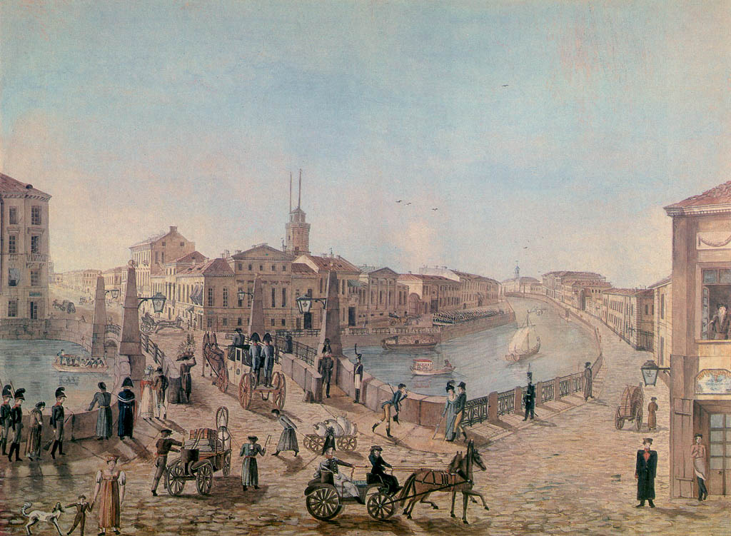 "Красный мост через Мойку по Гороховой улице". Акварель неизвестного художника. 1820-е гг. ГМИЛ.